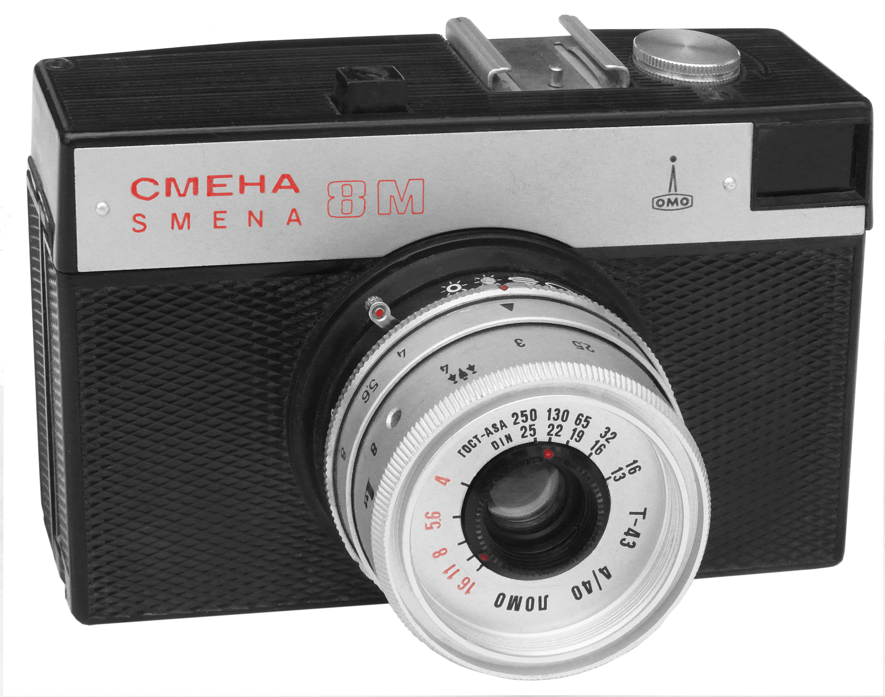 Unglaublich: Über 21 Millionen sollen von diesem Kästchen (zusammen mit der Vorgängerversion "Smena 8") produziert worden sein! Und es besteht sicher kein Anlass, dieser Quelle nicht zu glauben. Hergestellt wurde sie 1970 bis 1995 von LOMO ( = Ленинградское Oптико-Mеханическое Oбъединение, ЛОМО = Leningrader Optisch-mechanische Vereinigung). Inzwischen ist ja das "Lomographieren" bestens bekannt als eine besondere Art des Fotografierens - die aber nicht jedermanns Sache ist. Diese Kamera nur zum "Lomograhieren" einzusetzen, wird ihr eigentlich nicht gerecht. Dazu ist die Linse zu scharf, es ist ein Dreilinser von überraschender Qualität. Die Bedienung ist allerdings gewöhnungsbedürftig: Der Verschluss muss separat gespannt werden, es gibt keine Doppelbelichtungssperre, der Sucherausschnitt ist sehr großzügig und die Entfernung muss geschätzt werden. Beim Auslösen darf man den Apparat auf keinen Fall "normal" halten, der Mittelfinger würde dem Ablauf des Aufzugshebels ins Gehege kommen. Das gibt dann lustige Bilder (siehe unten). Die Angaben auf dem Objektiv werden sowohl dem Laien als auch dem Fortgeschrittenen gerecht: Mit der Filmempfindlichkeit (ASA/DIN) stellt man eigentlich nur die Blende (4-16) ein, die auch angezeigt wird. Die Verschlusszeit (1/15 bis 1/250 und B) kann man nach Wettersymbolen oder numerisch einstellen, kürzeste Entfernung ist 1 m. Selbstauslöser und Mittenkontakt gibt's nicht, ebensowenig wie eine Rückspulkurbel, da begnügt man sich mit einem geriffelten Rädchen. Die Aufwickelspule ist ein loses Teil. Bei meinem Exemplar fehlte sie, die leere Spule einer Filmpatrone übernimmt jetzt problemlos diese Aufgabe. Mehr als 5 € solte man für dieses lustige Gerät nicht ausgeben. Man kann es auch direkt in Russland bestellen, da legt man 15 bis 25 € hin (+ Porto). Hier kostet es 80 Euro.